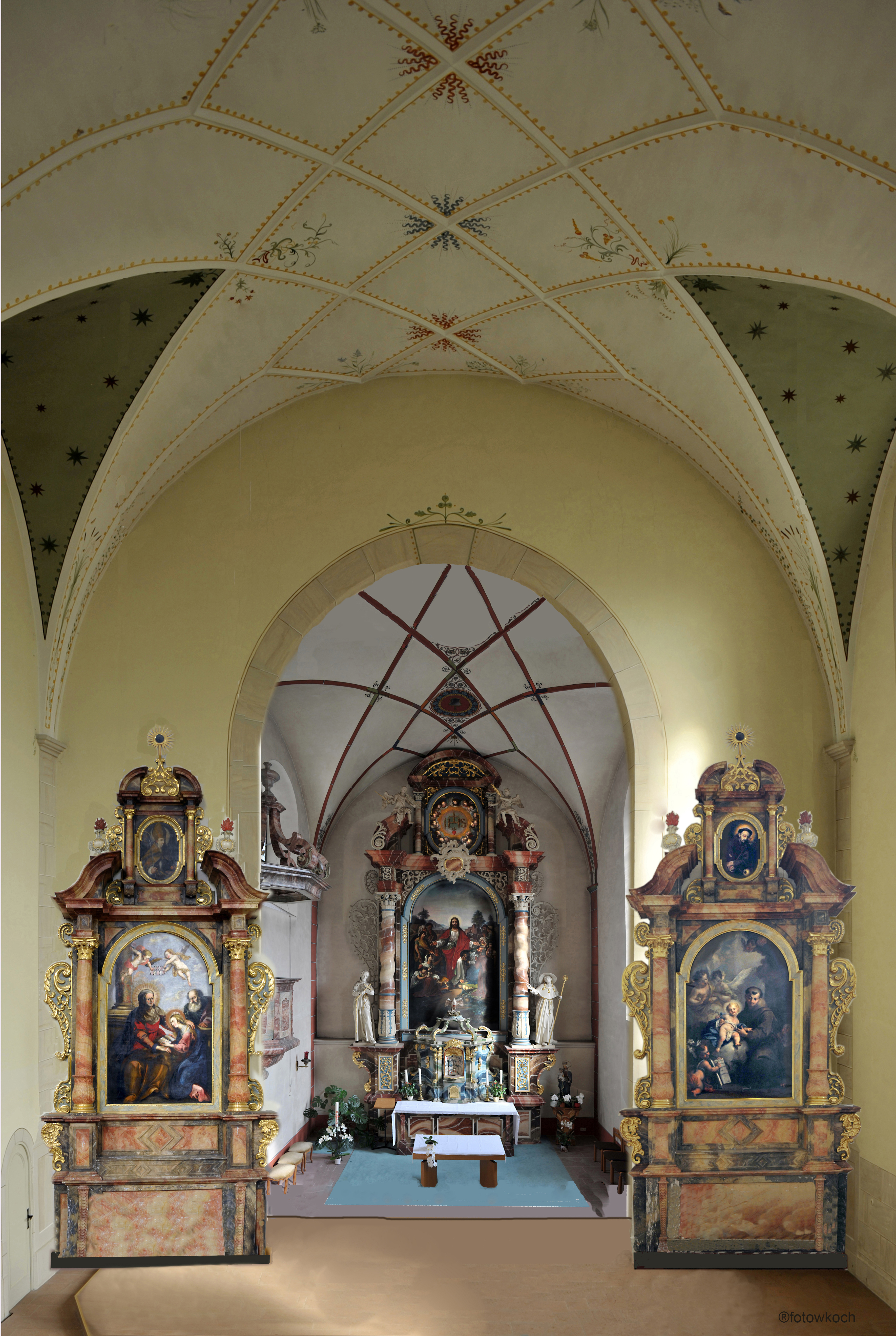 Fotomontage von Wilfried Koch (nach einem möglichen Wanddurchbruch)